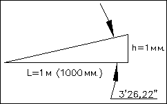 O esquema de №1